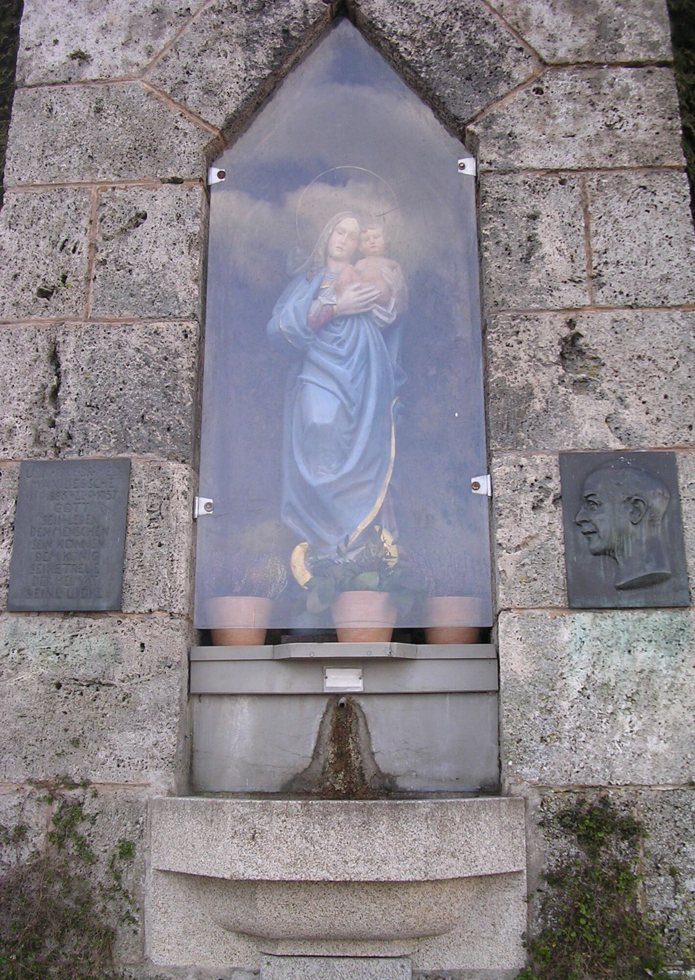 Marienbrunnen mit Gedenktafeln für Max Lebsche in Glonn, Oberbayern/Deutschland